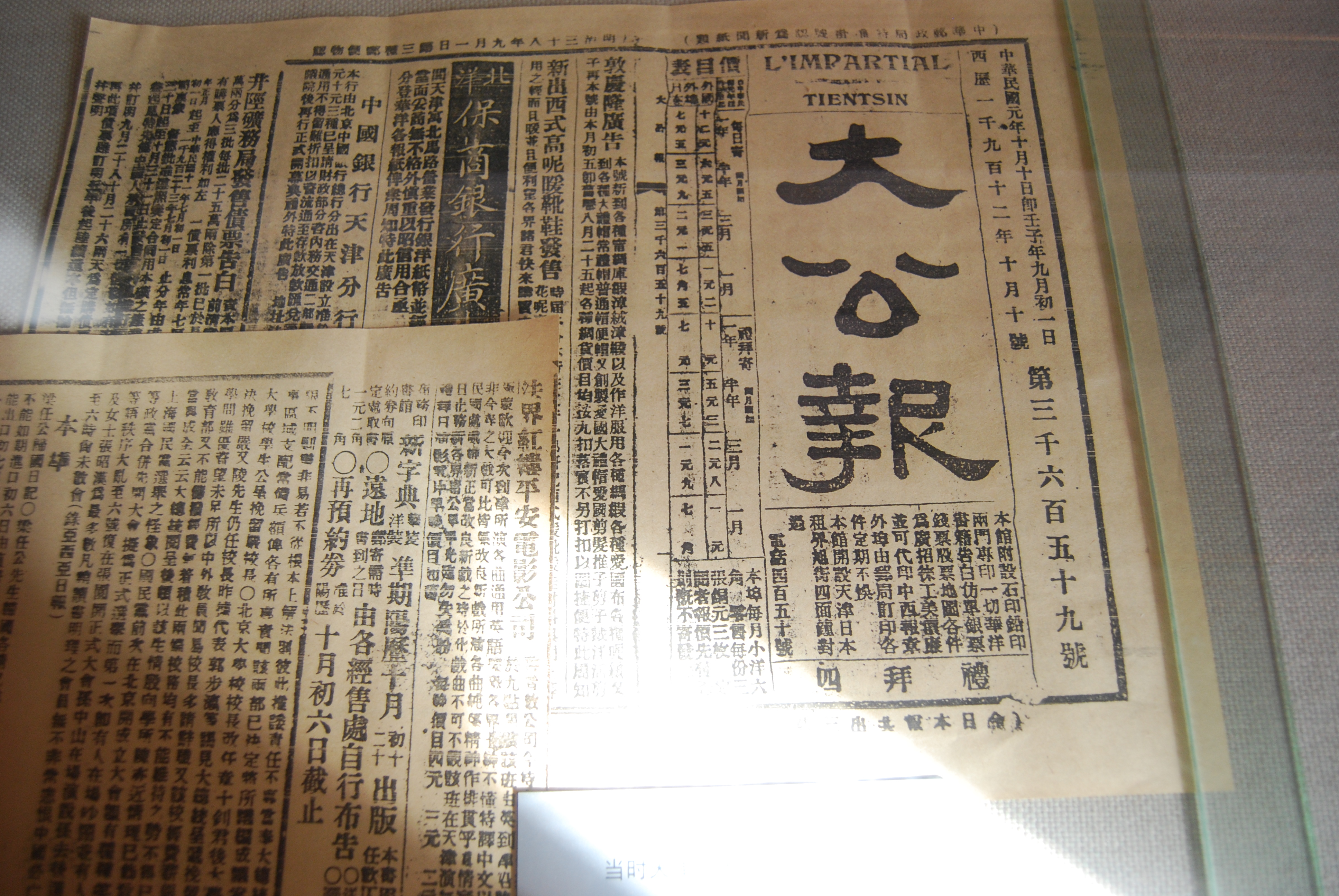 中文（中国大陆）: 民国一年（1911年）的天津大公报